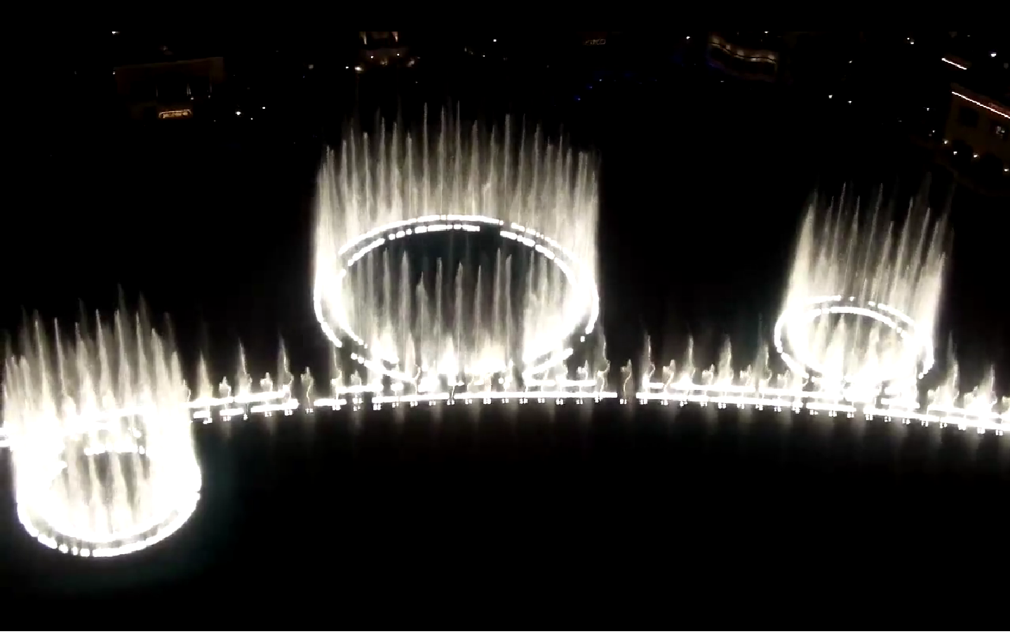 中文（香港）: 美國內華達州拉斯維加斯